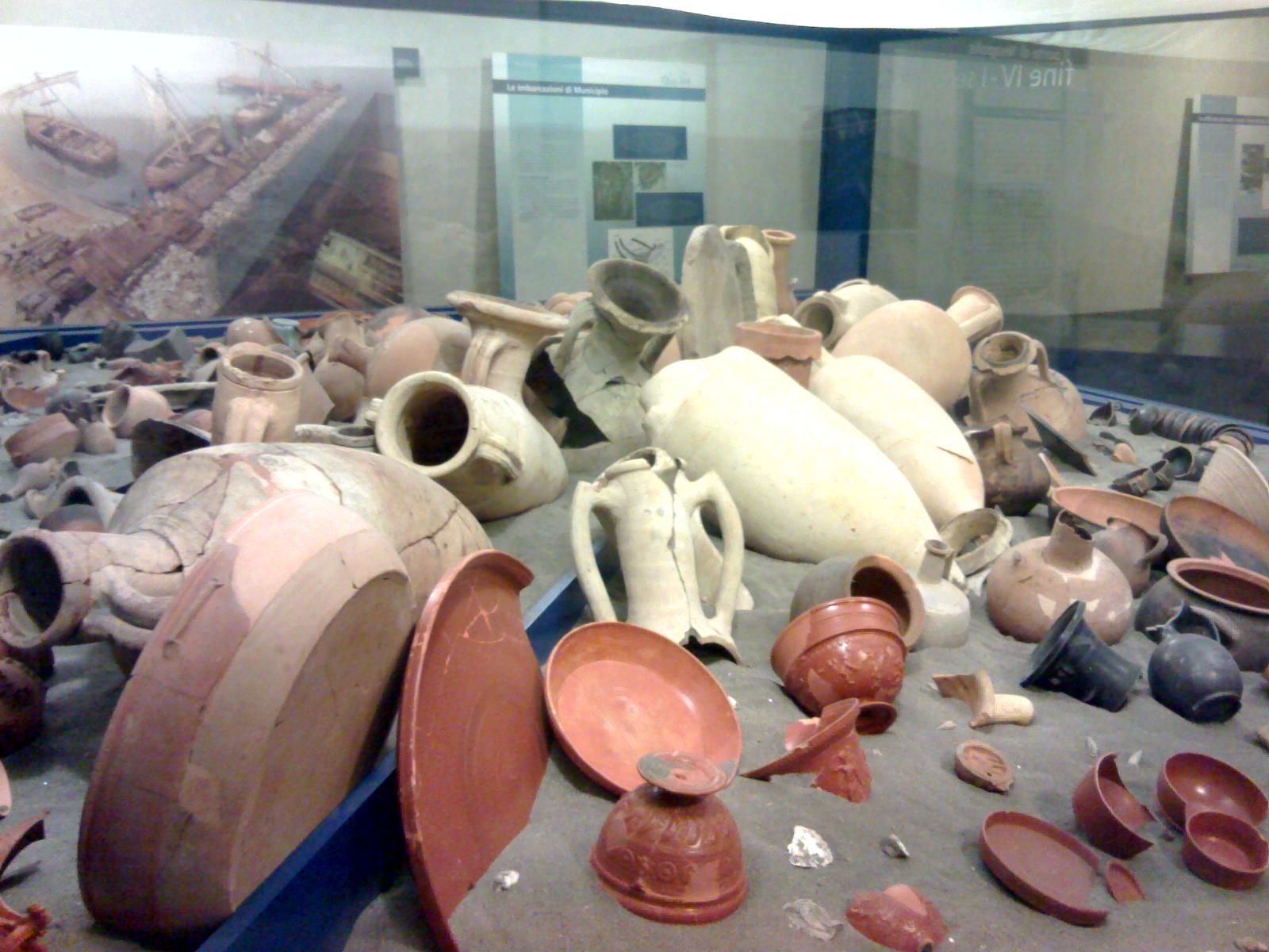 Alcuni reperti del Museo Stazione Neapolis di Napoli.